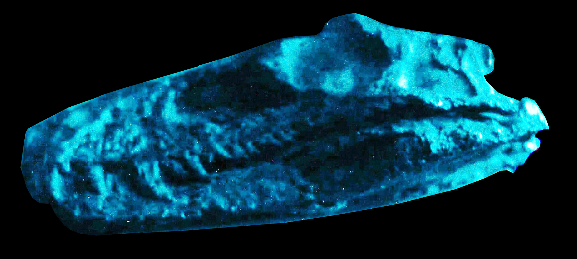 Skull of Herrerasaurus ischigualastensis, Valle de la Luna, Parque Provincial Ischigualasto, Provincia de San Juan, Argentina